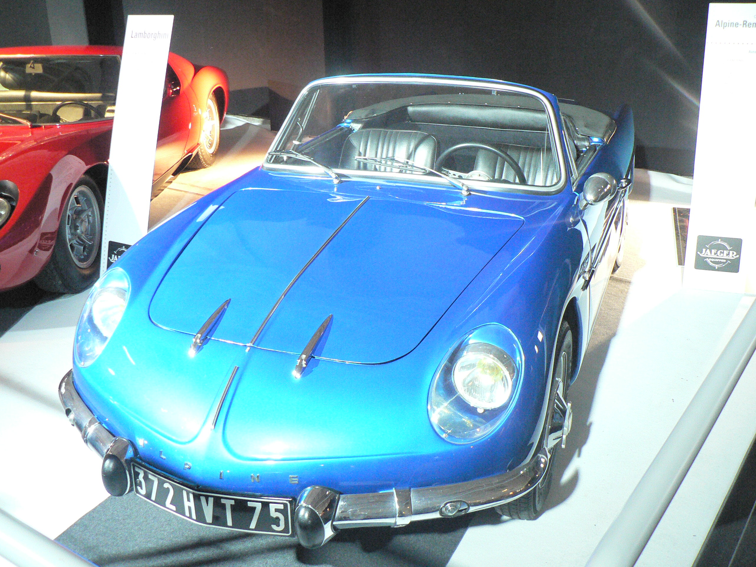 Mondial de l automobile de Paris (October 2006) Subject:Alpine A108 Convertible